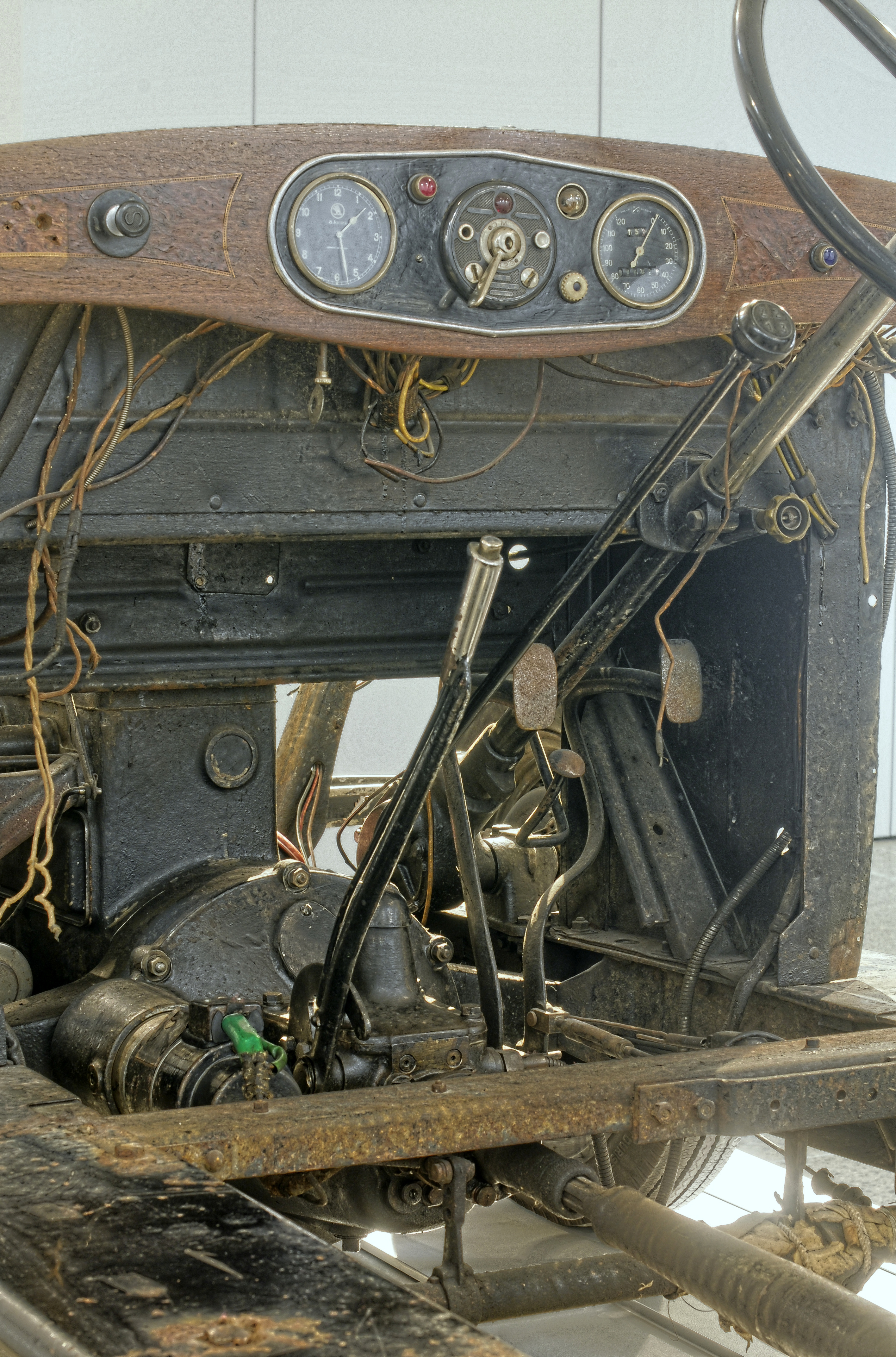 Fototermin Škoda Museum Mladá Boleslav 2013 Fototermin Škoda Muzeum 5. April 2013 in Mladá Boleslav This work is free and may be used by anyone for any purpose. If you wish to use this content, you do not need to request permission as long as you follow any licensing requirements mentioned on this page.